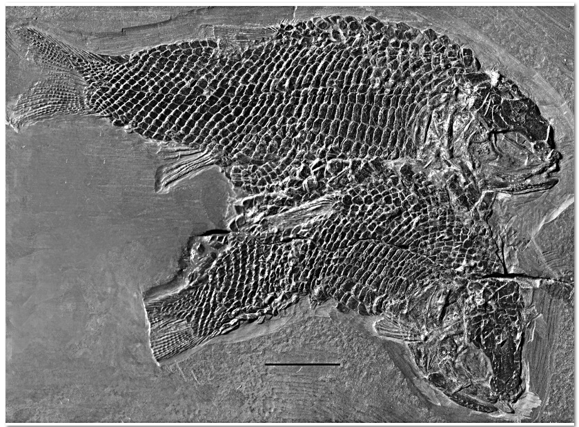 Holotype, GMPKU-P-3163, a skeleton, and paratype. Its type locality is Layer 35, Nimaigu Village, Wusha Township, Xingyi, which is in a Longobardian marine limestone in the Falang Formation of China.